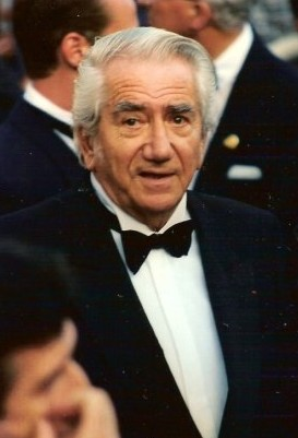 Daniel Gélin au festival de Cannes